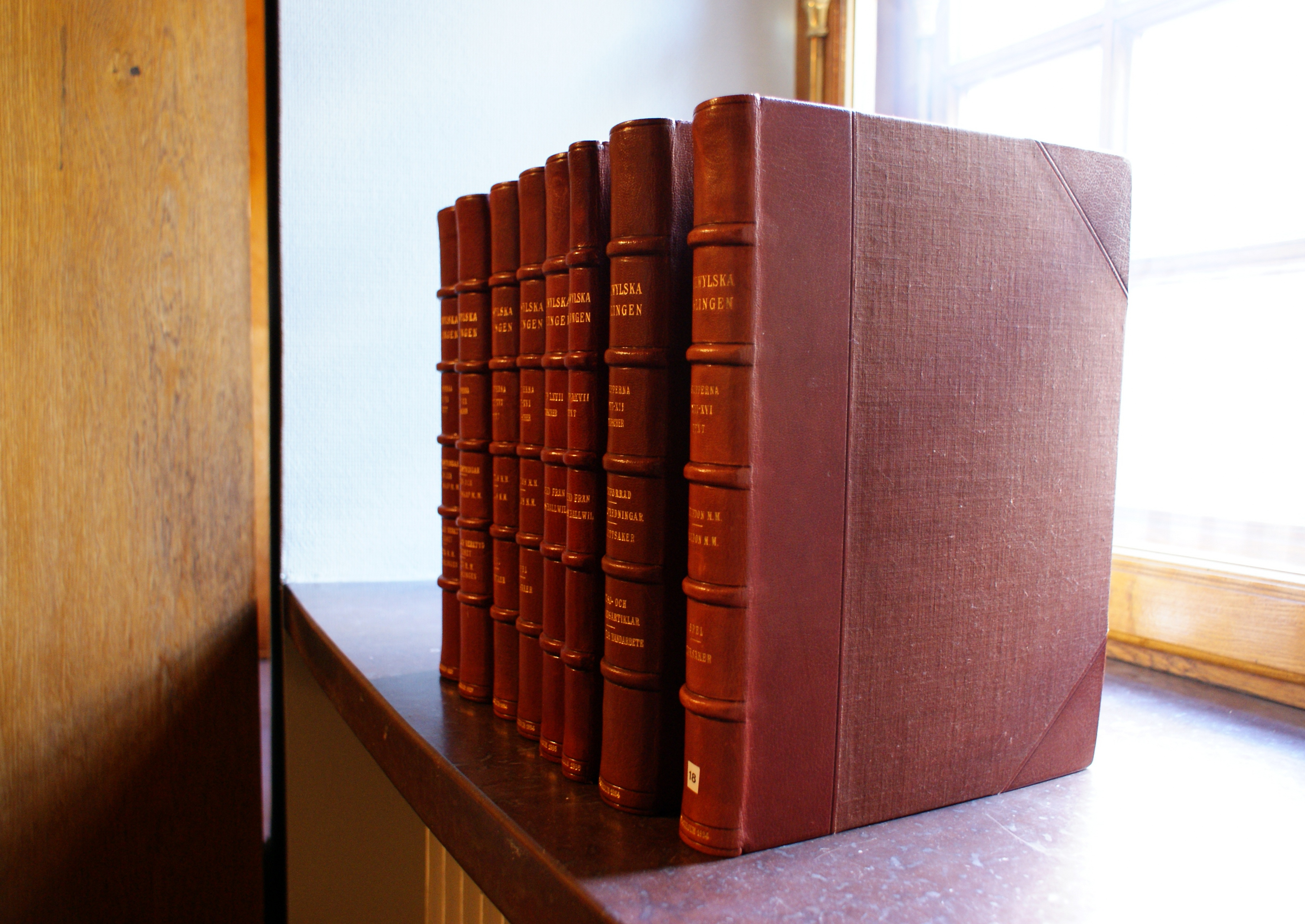 En del av katalogerna som dokumenterar den Hallwylska samlingen. Hallwyl Museum Native nameHallwylska museetLocationHamngatan 4 in Stockholm, SwedenCoordinates59° 19′ 59″ N, 18° 04′ 28″ E Established1938Websitehallwylskamuseet.seAuthority control VIAF: 147301988 GND: 1006859-4 SUDOC: 026415534 BNF: 11866668n